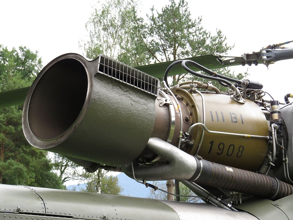 Aérospatiale SA-319 Alouette III Turbine